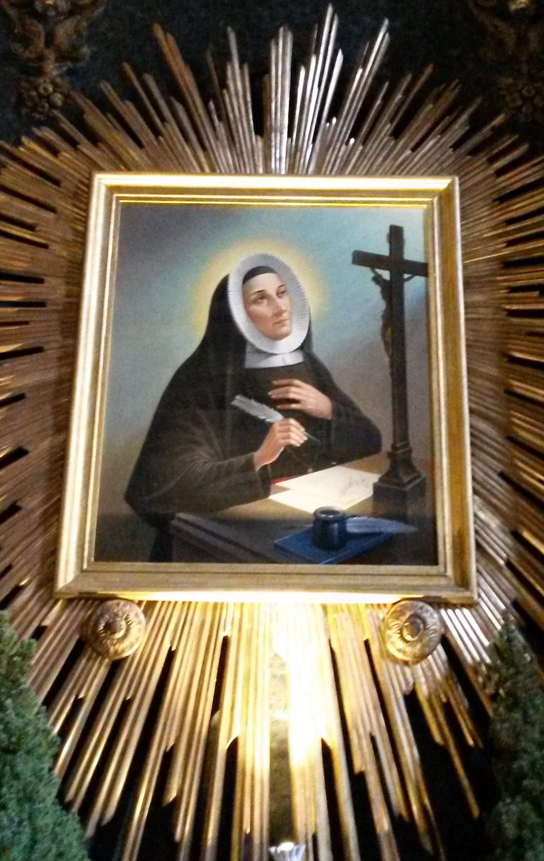 Altar de Santa María de Mattia en la Iglesia de Santa María in Trivio. Roma-Italia.